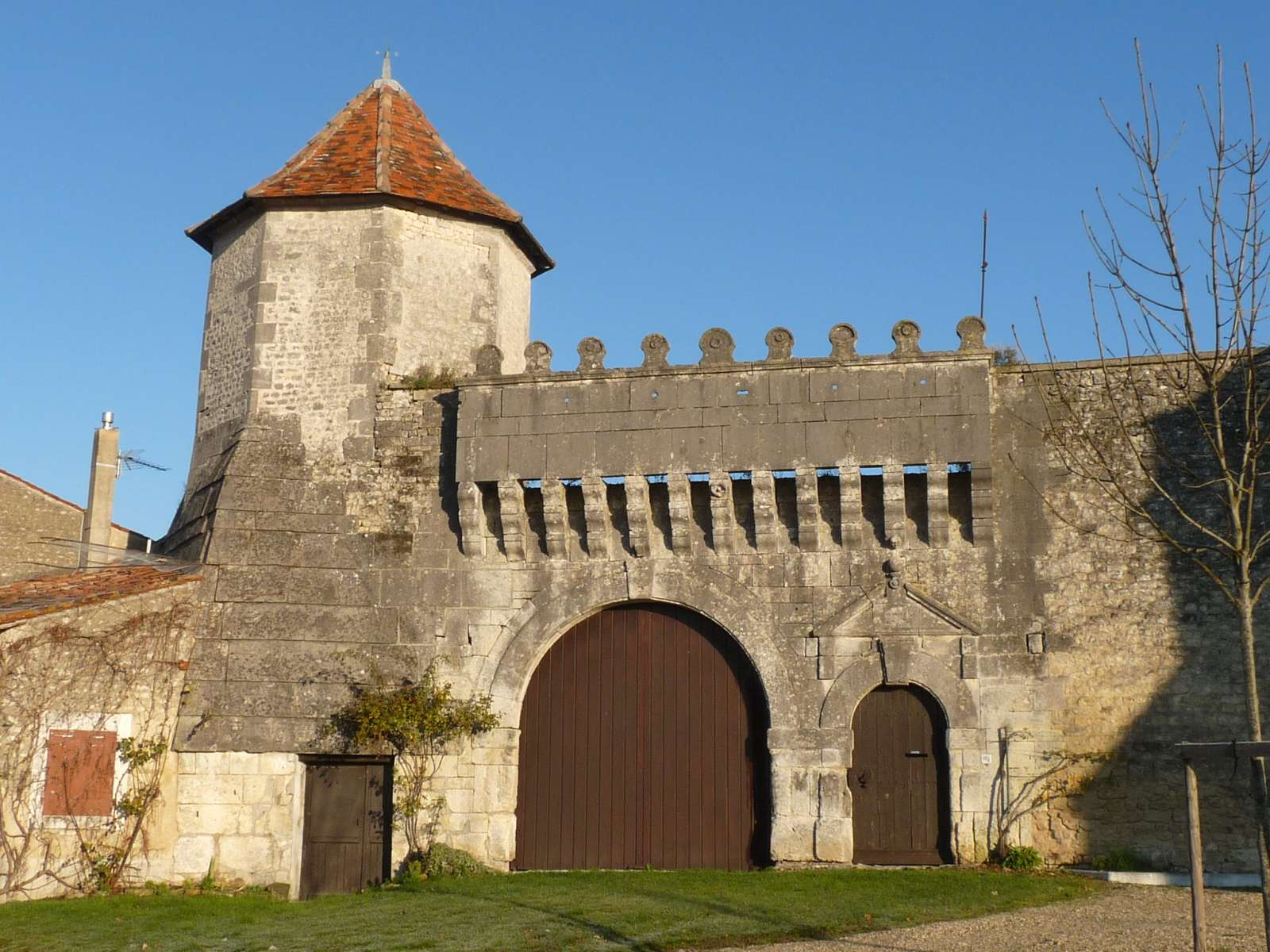 entrée du château de Juillac-le-Coq, Charente, France